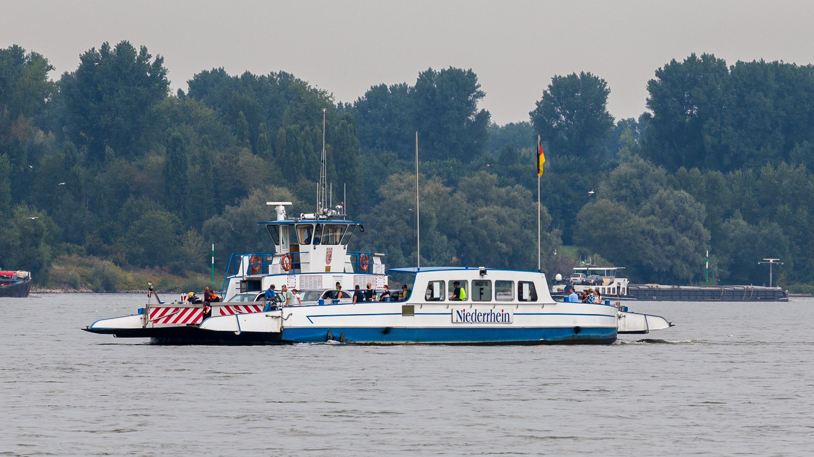 Rheinfähre Zons-Urdenbach - Fährschiff Niederrhein - ENI 04026710 - auf dem Rhein